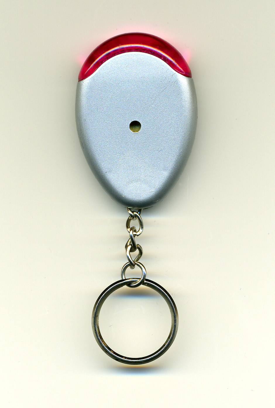 key finder